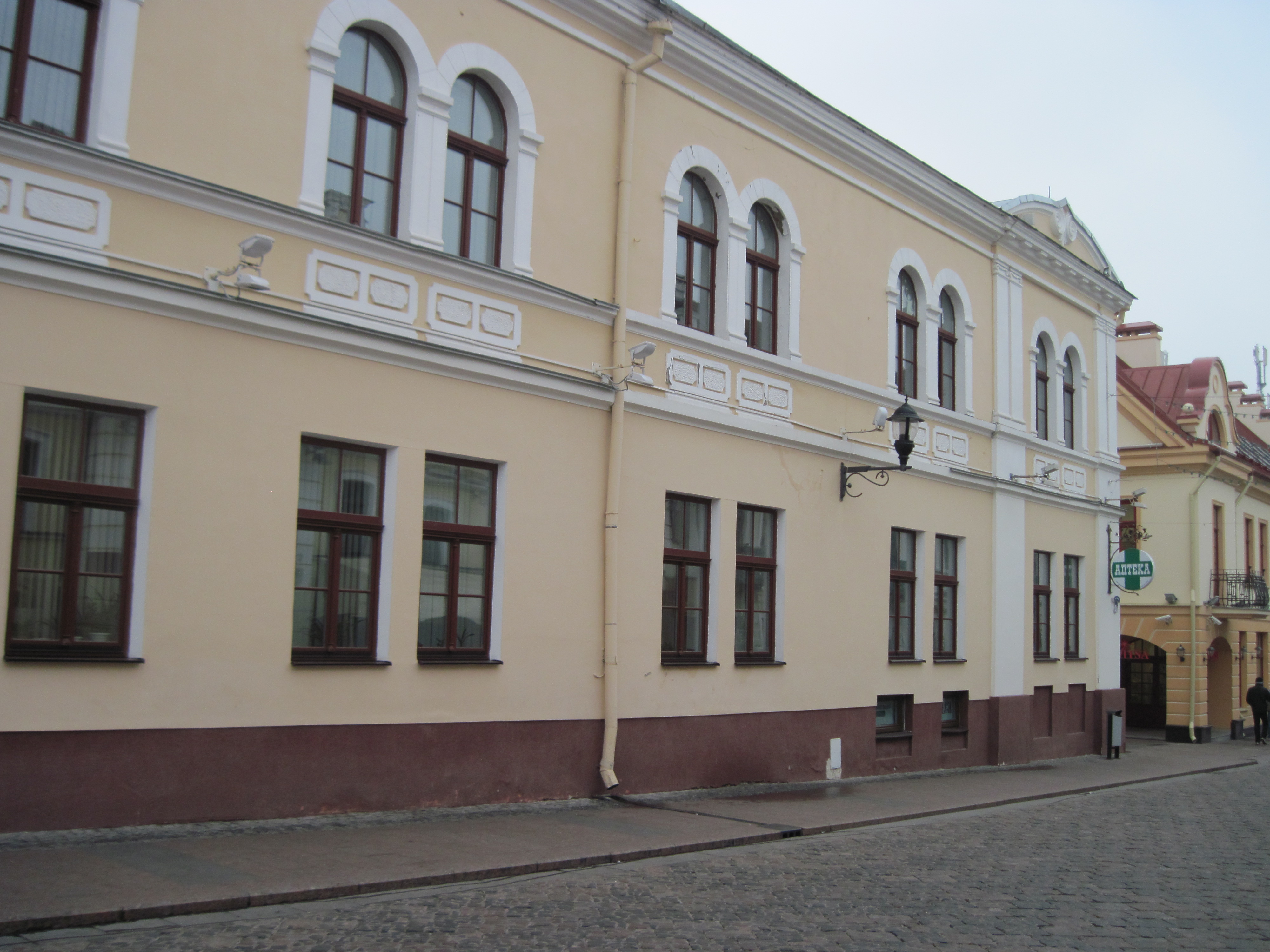 Беларуская (тарашкевіца): Будынак па вуліцы Савецкая, 14